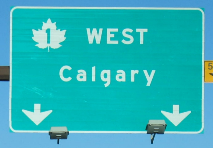 Signalisation routière sur la Transcanadienne